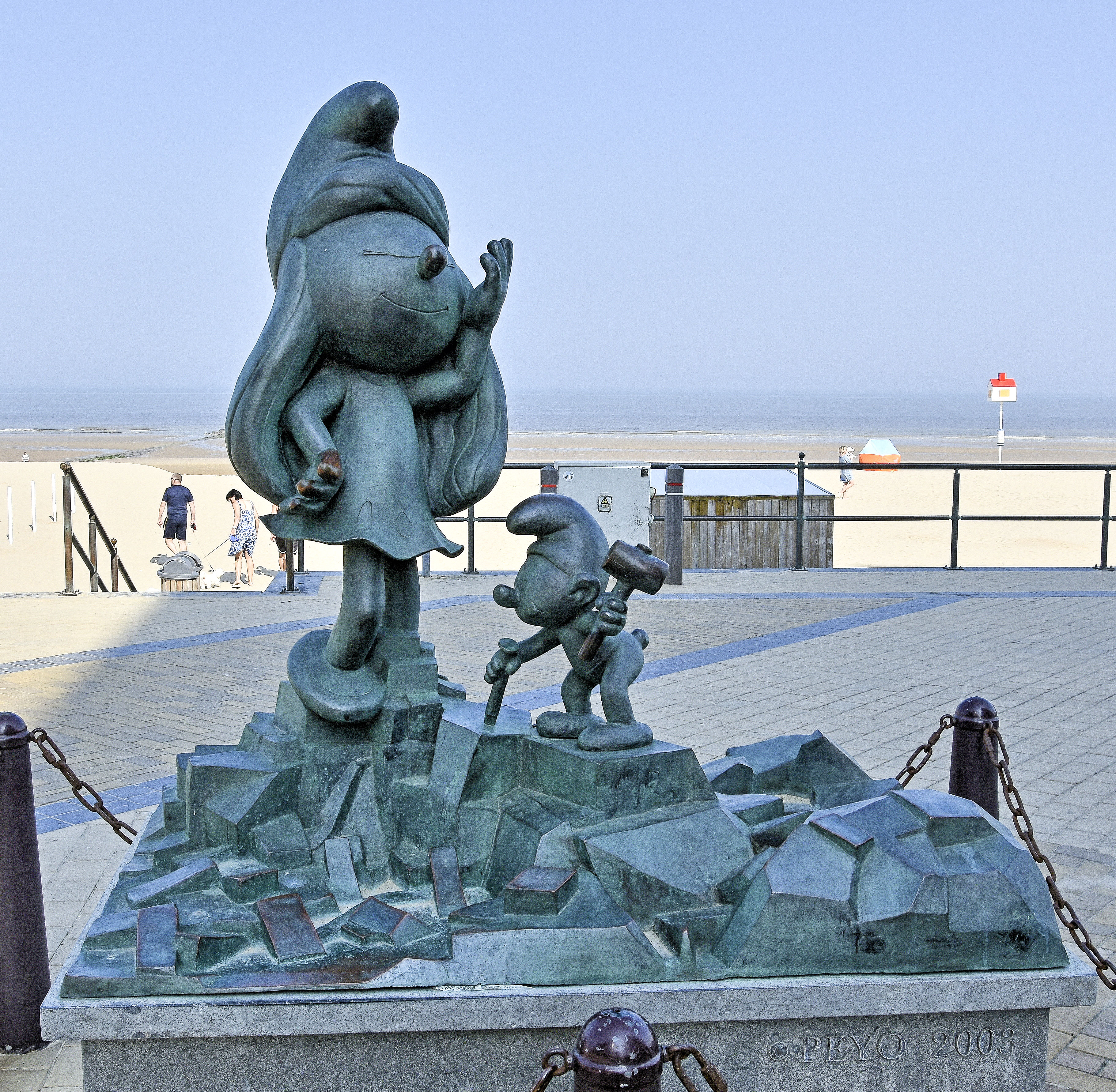 Monique Mol - Smurfin en Potige Smurf - Stripstandbeelden Middelkerke